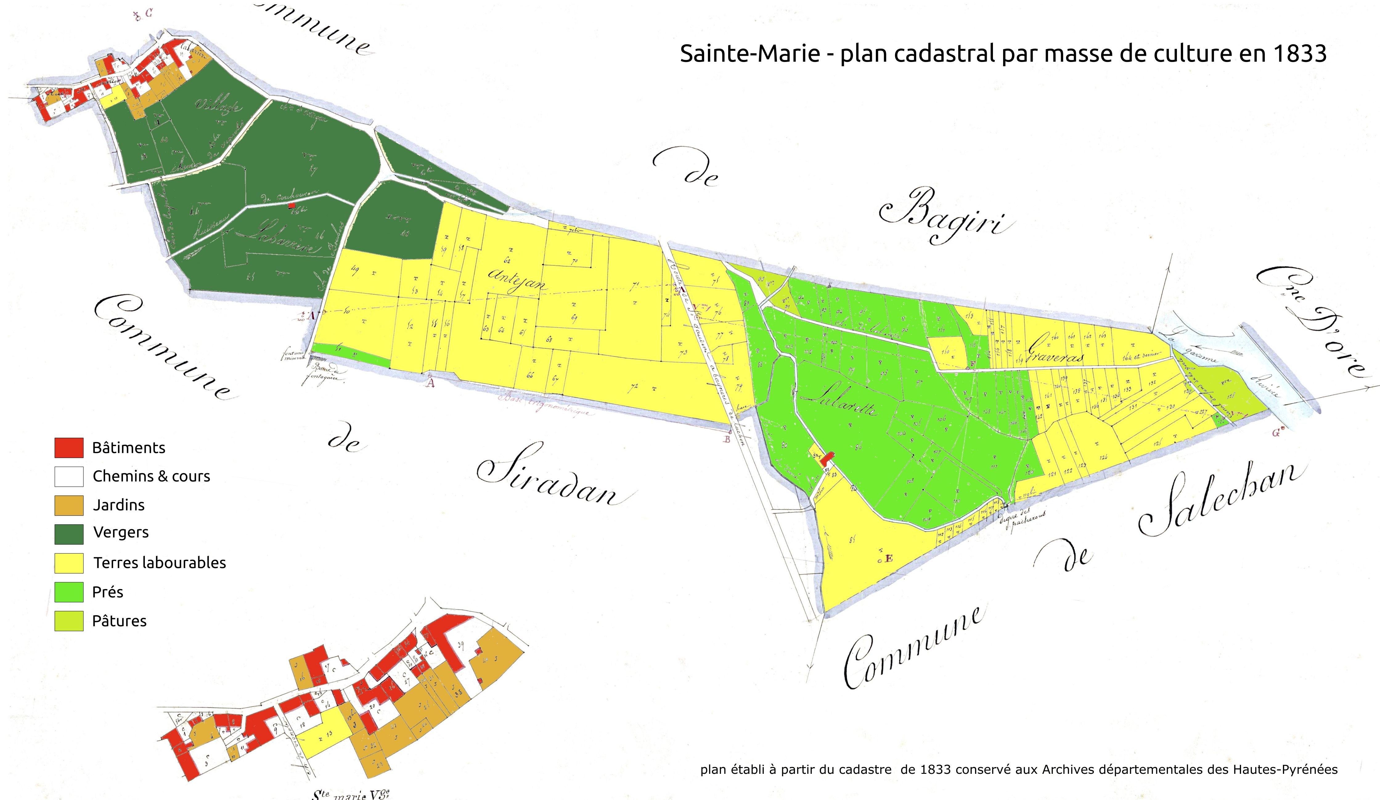 Commune de Sainte-Marie (Hautes-Pyrénées) - plan de masse des cultures en 1833. Travail personnel à partir du plan cadastral de 1833 conservé aux Archives départementales des Hautes-Pyrénées